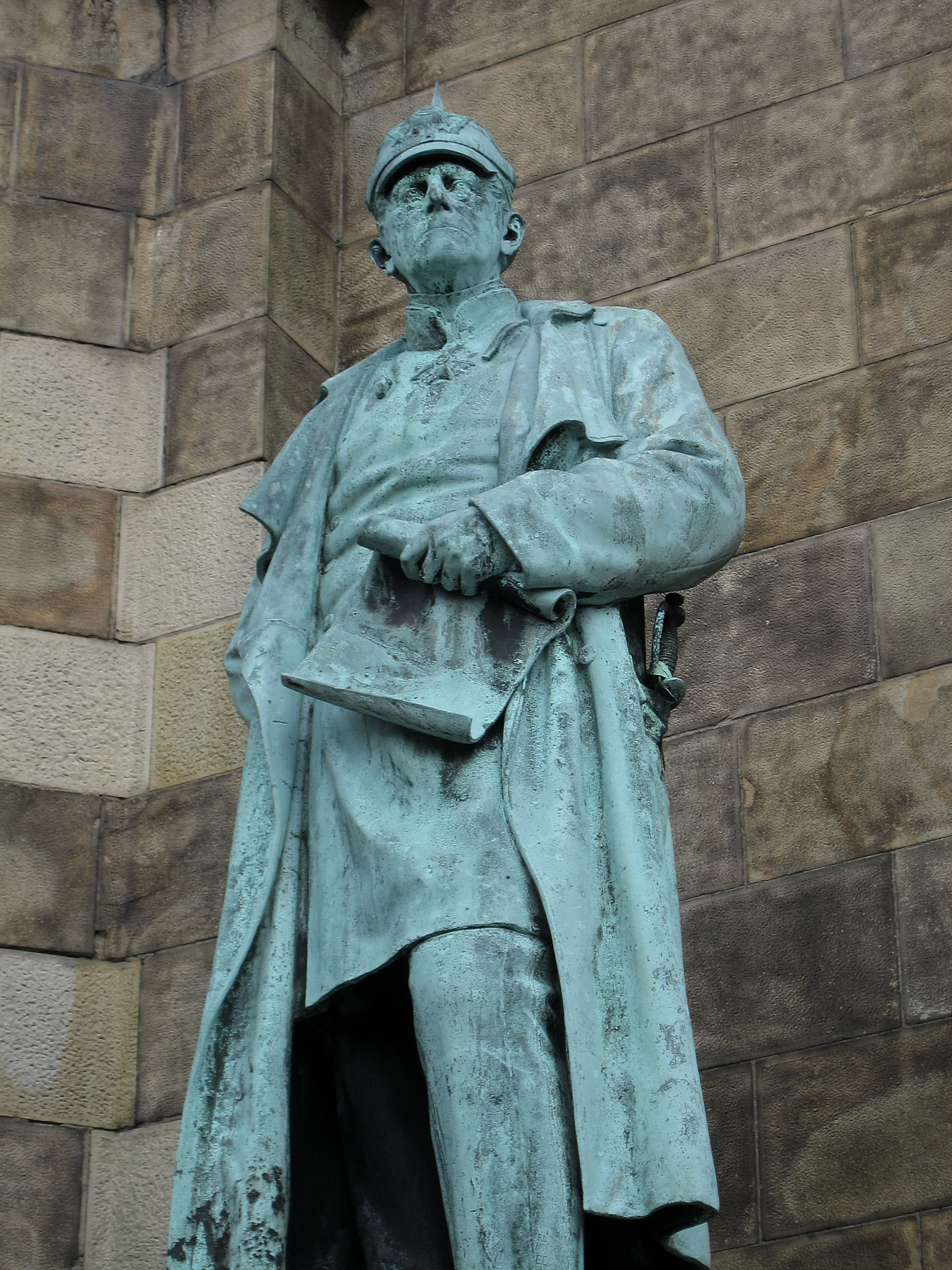 Dortmund, Syburg, Denkmal